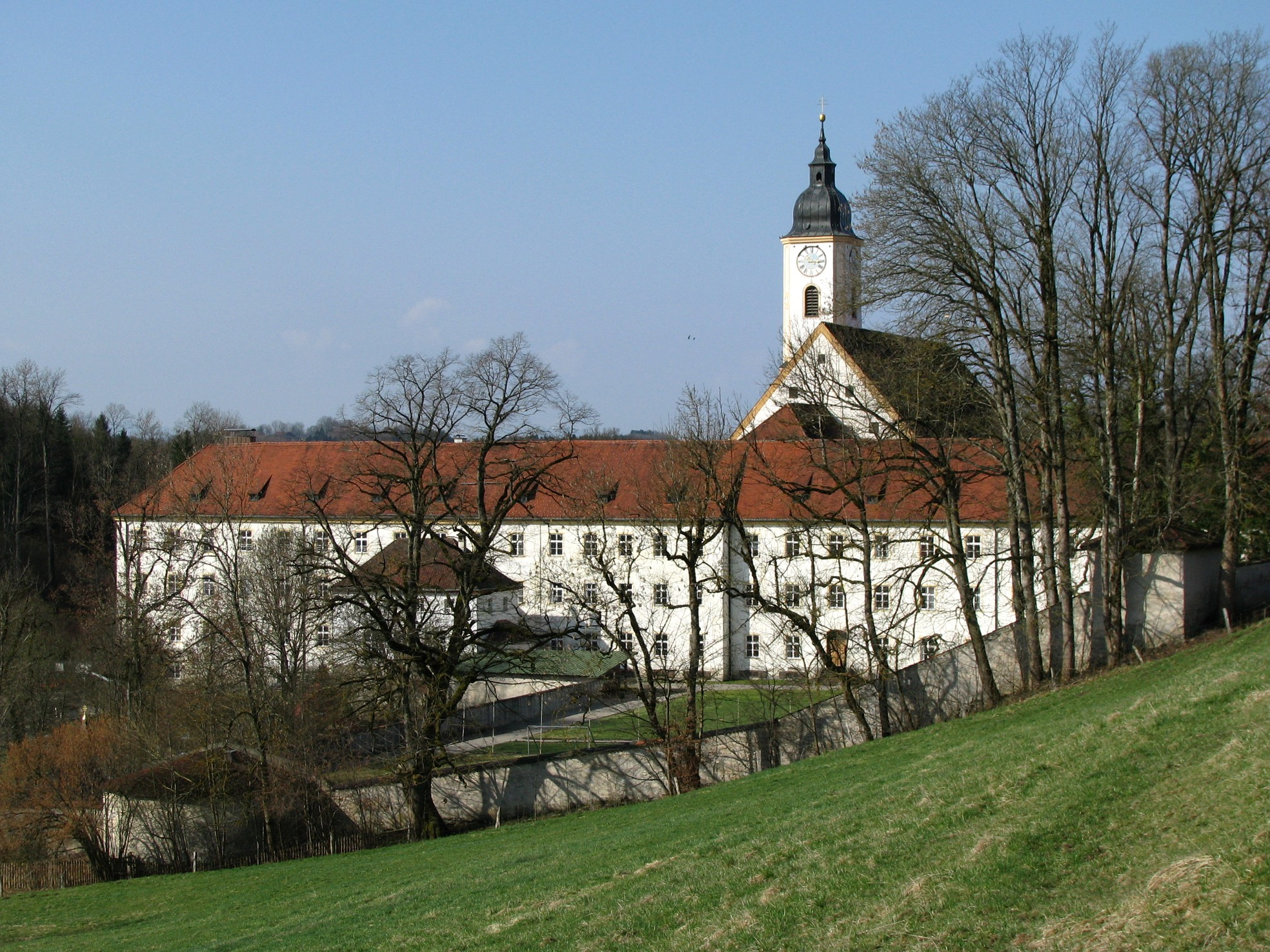 Kloster Dietramszell aus östlicher Richtung